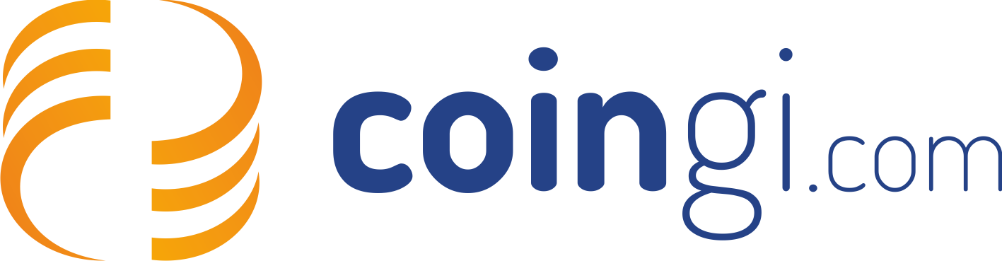 Logo Coingi Exchange